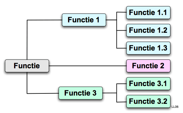 Functie boom. Juli 2006. Laurens van Lieshout.